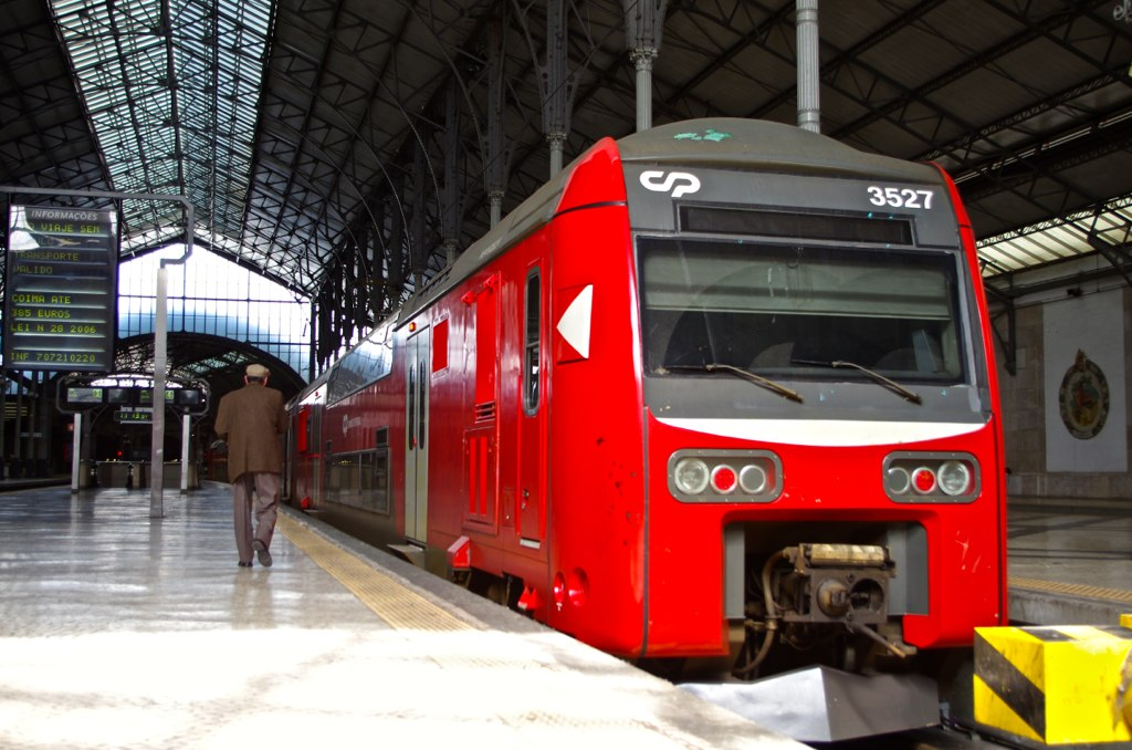 Un automotor eléctrico de la serie 3500 de CP en la estación de Lisboa Rossio (Portugal).